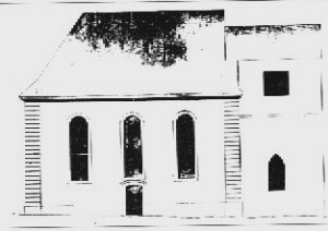 représentation de l'église d'Eckendorf (Alteckendorf) vers 1765.